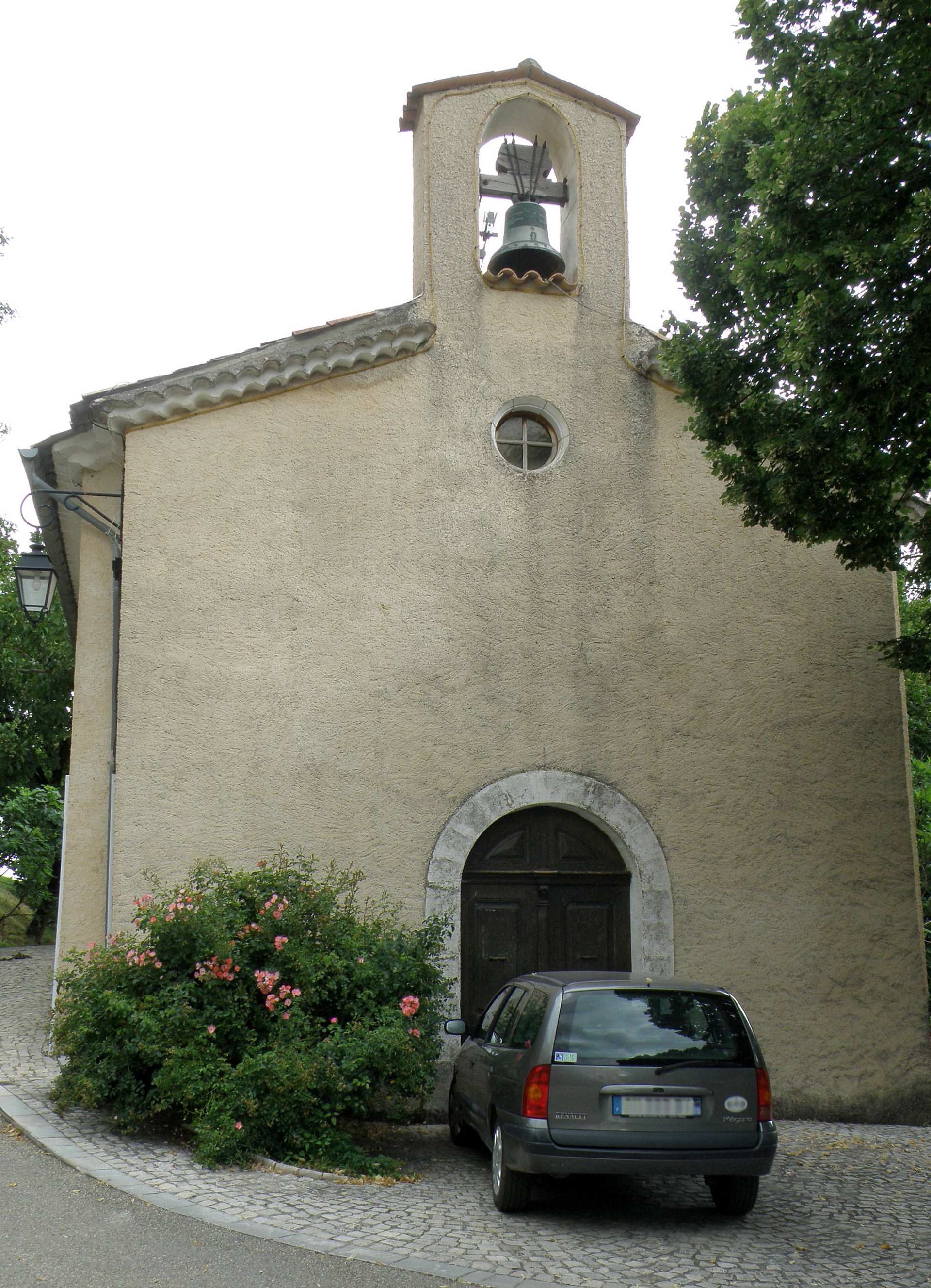 Eygaliers (Drôme, France). Église Sainte-Madeleine.